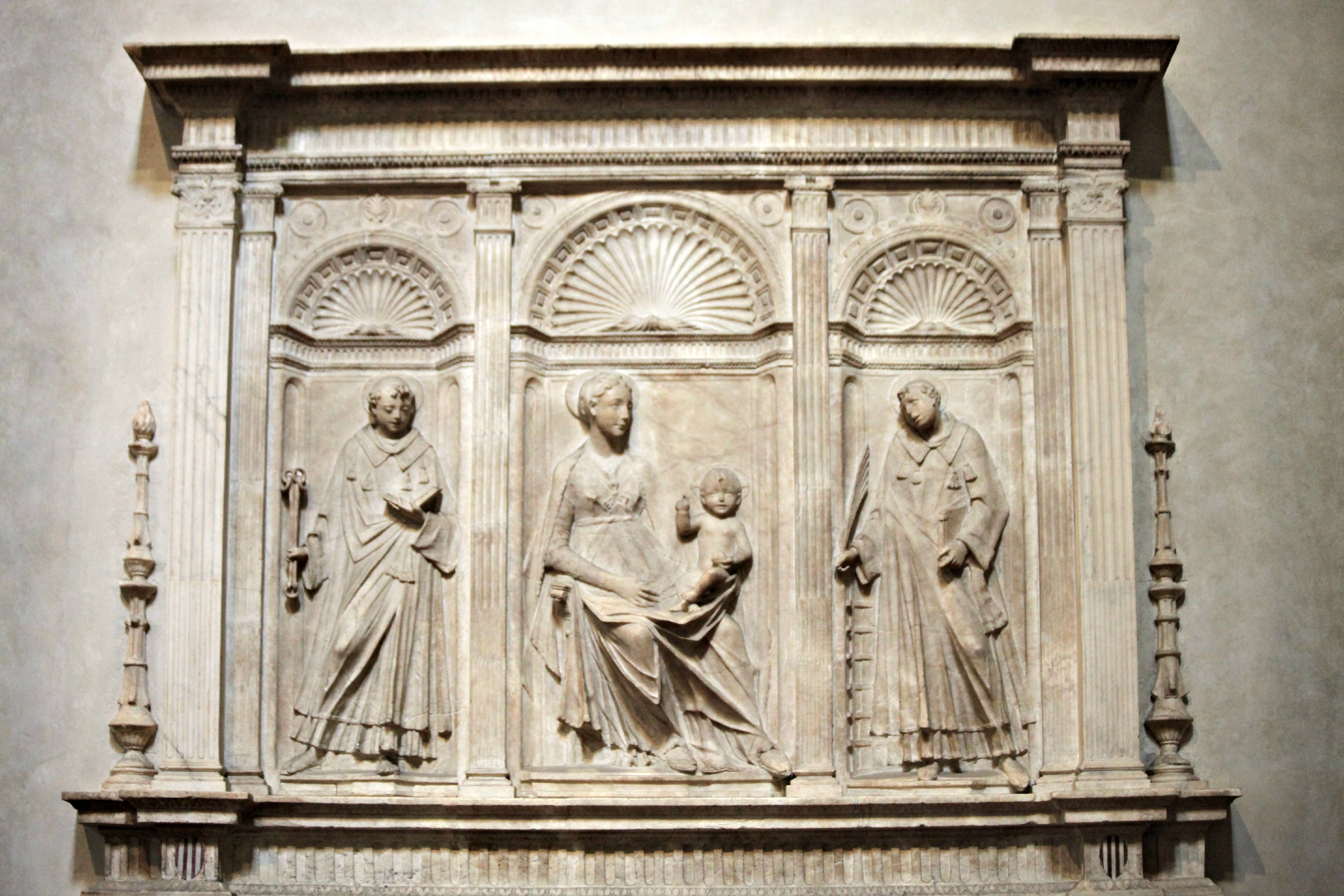 Dossale di Mino da Fiesole, Badia Fiorentina (1)